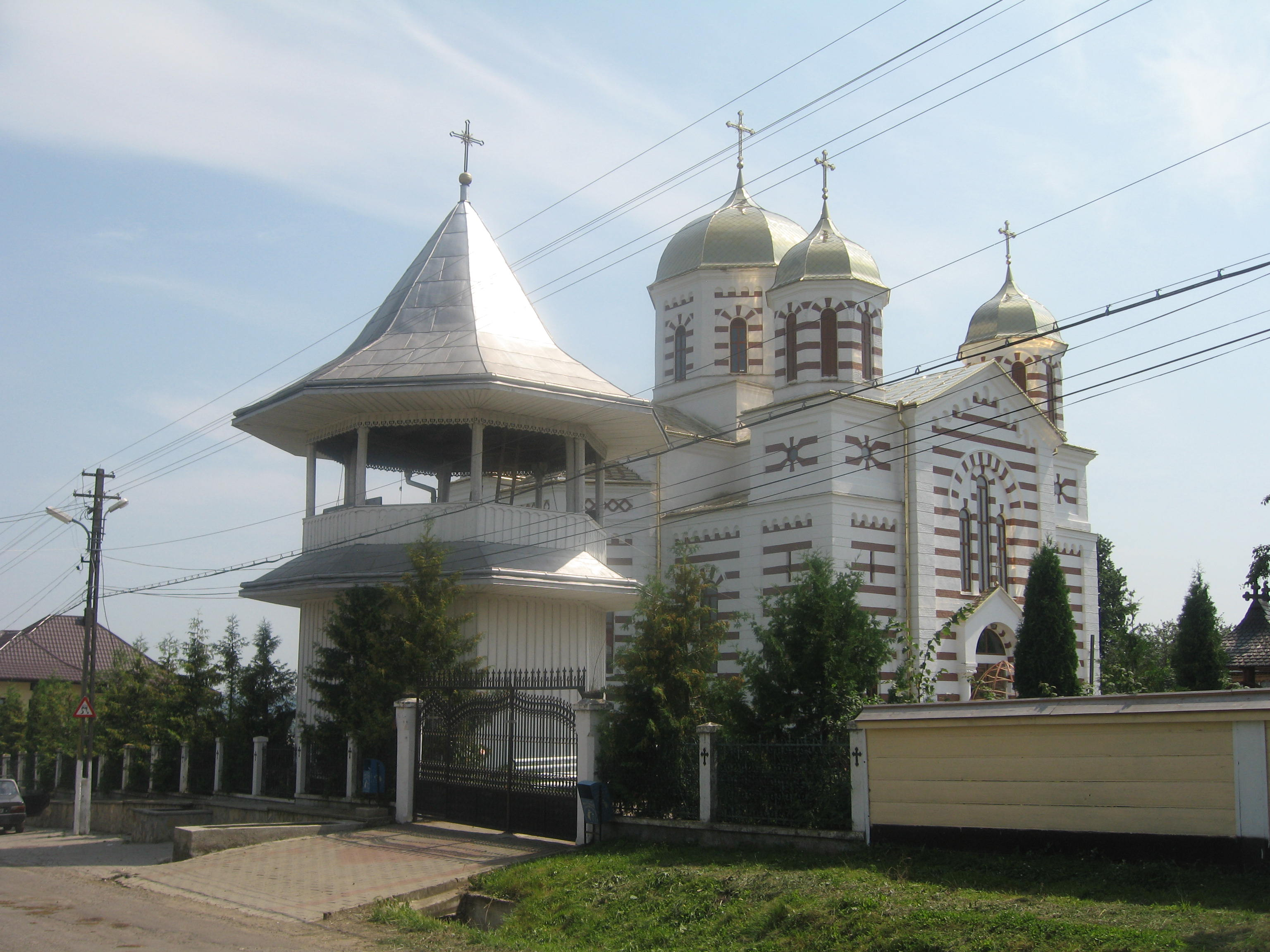 Biserica Sf. Arhangheli din Cajvana, Suceava County